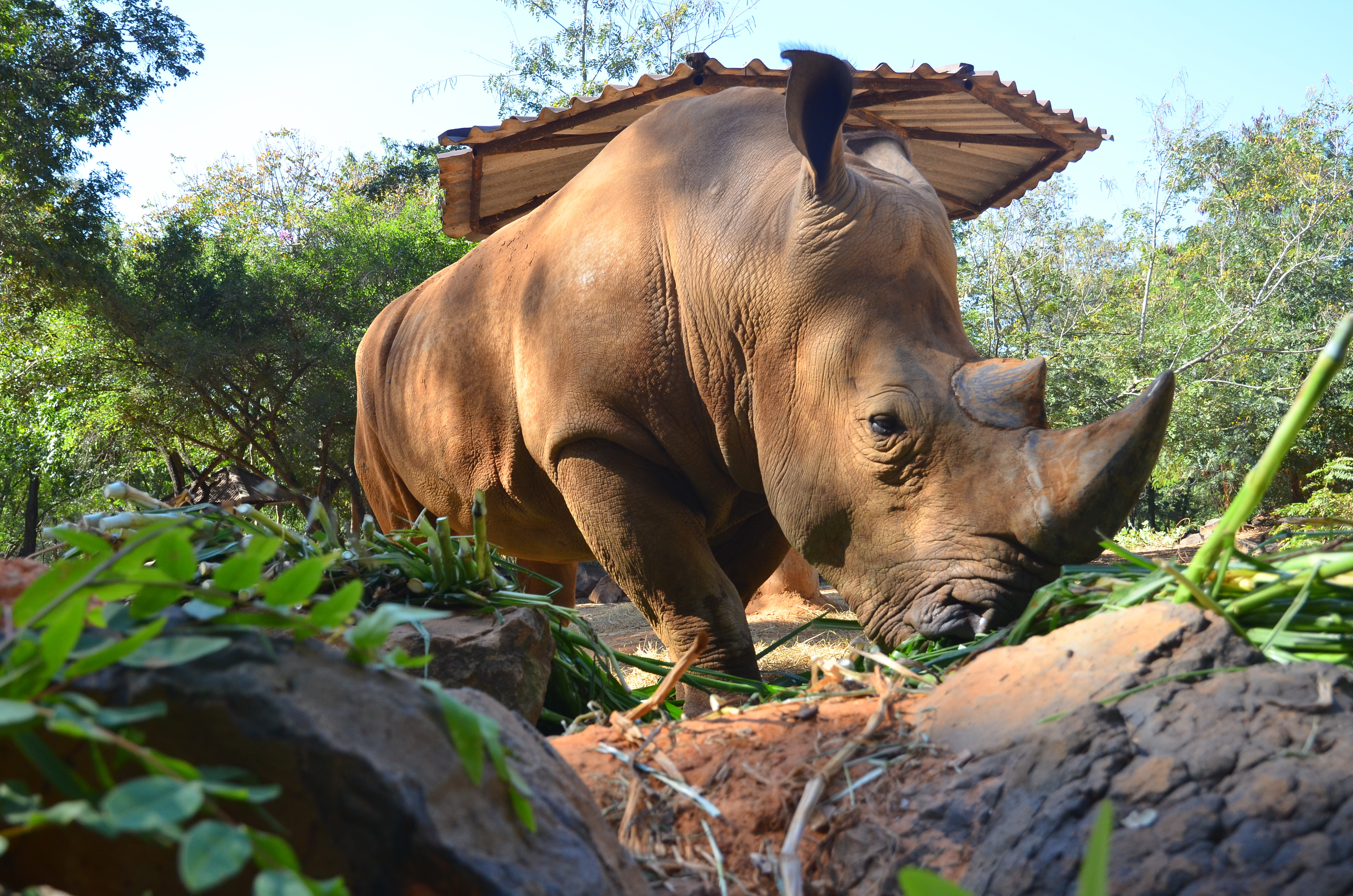 แรดขาวที่สวนสัตว์นครราชสีมา